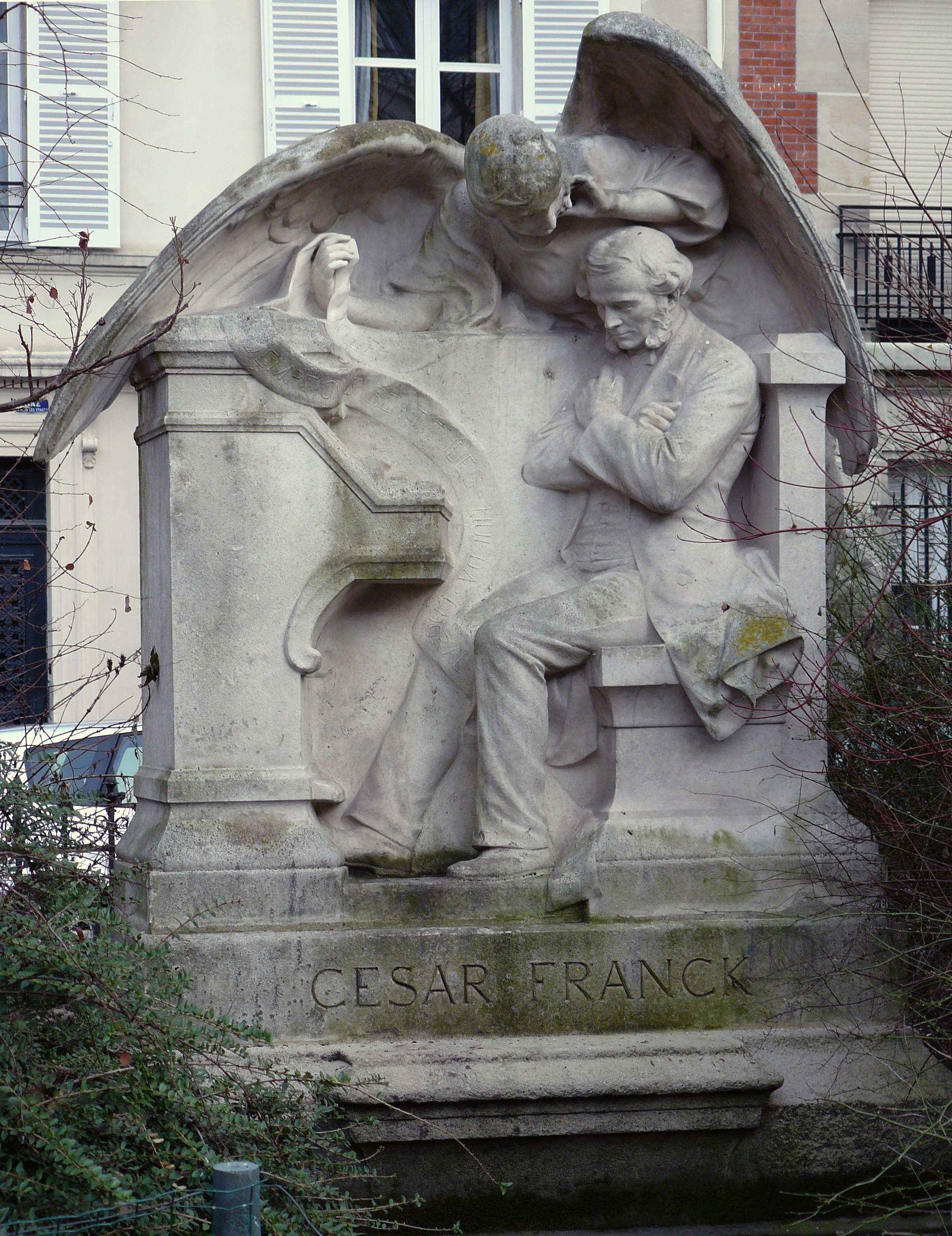 « Monument à César Franck » 1891, square Samuel-Rousseau, 7e arrondissement de Paris - sculpteur Alfred-Charles Lenoir (1850-1899)